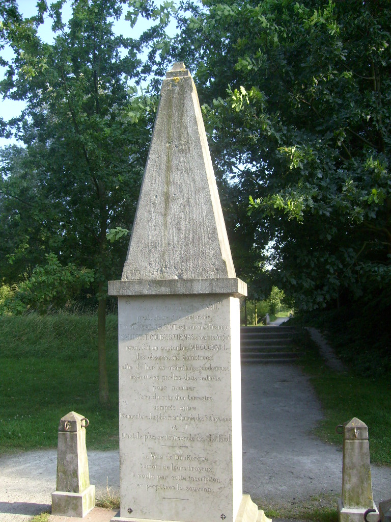 Monument en l'honneur de la Méridienne entre Dunkerque et Barcelone à Dunkerque